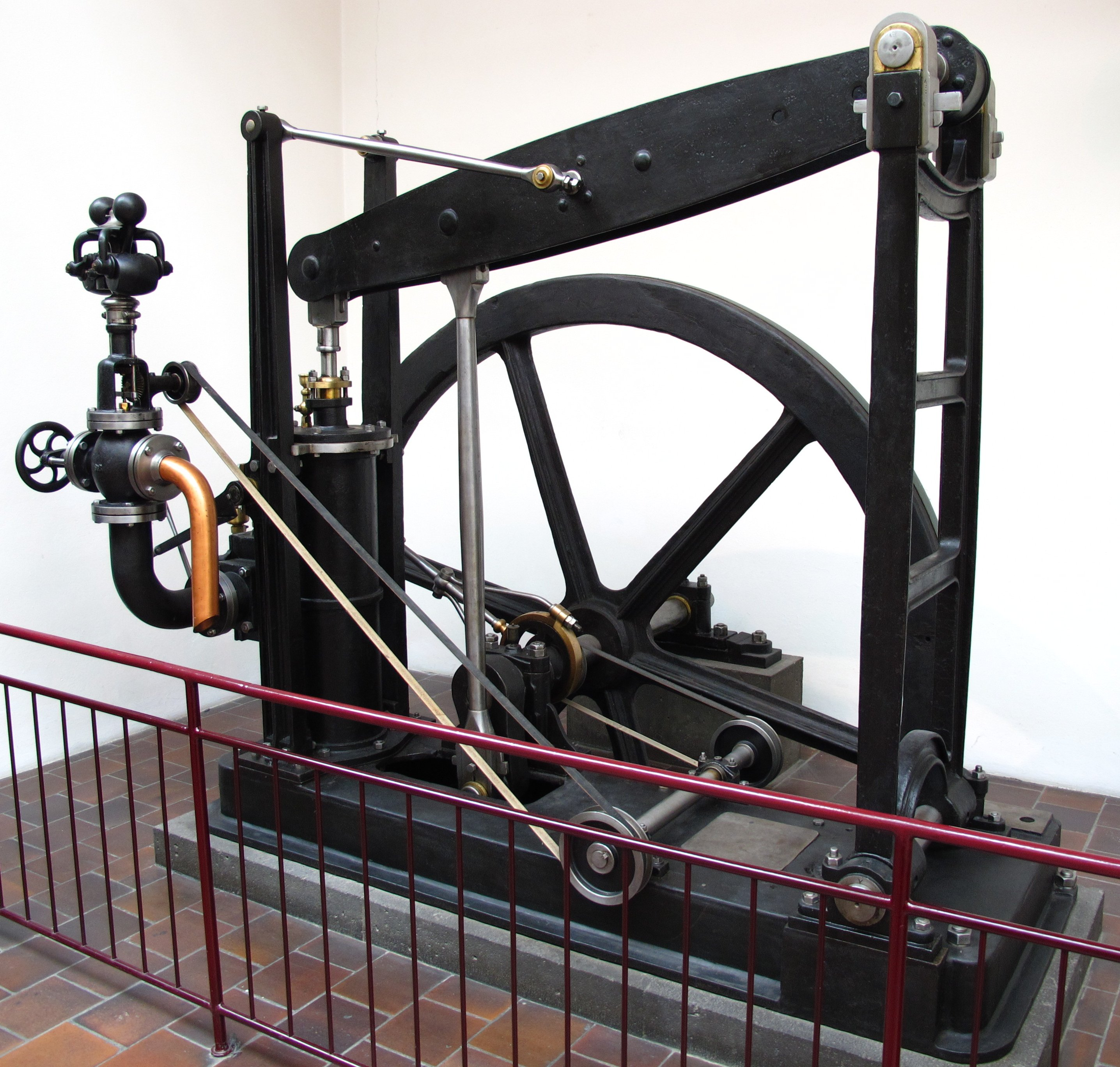 Die Halbbalancier-Dampfmaschine wurde vom Amerikaner Oliver Evans 1807 entwickelt. Der Halbbalancier benötigt gegenüber einer Balanciermaschine gleicher Leistung weniger Platz. Hersteller: Erste Deutsche Eisenbahnschienen-Compagnie, 1847 Kolbendurchmesser: 220 mm Kolbenhub: 540 mm Dampfdruck: 5 bar Drehzahl 40 bis 50 RPM Leistung: 7,3 bis 10,8 kW